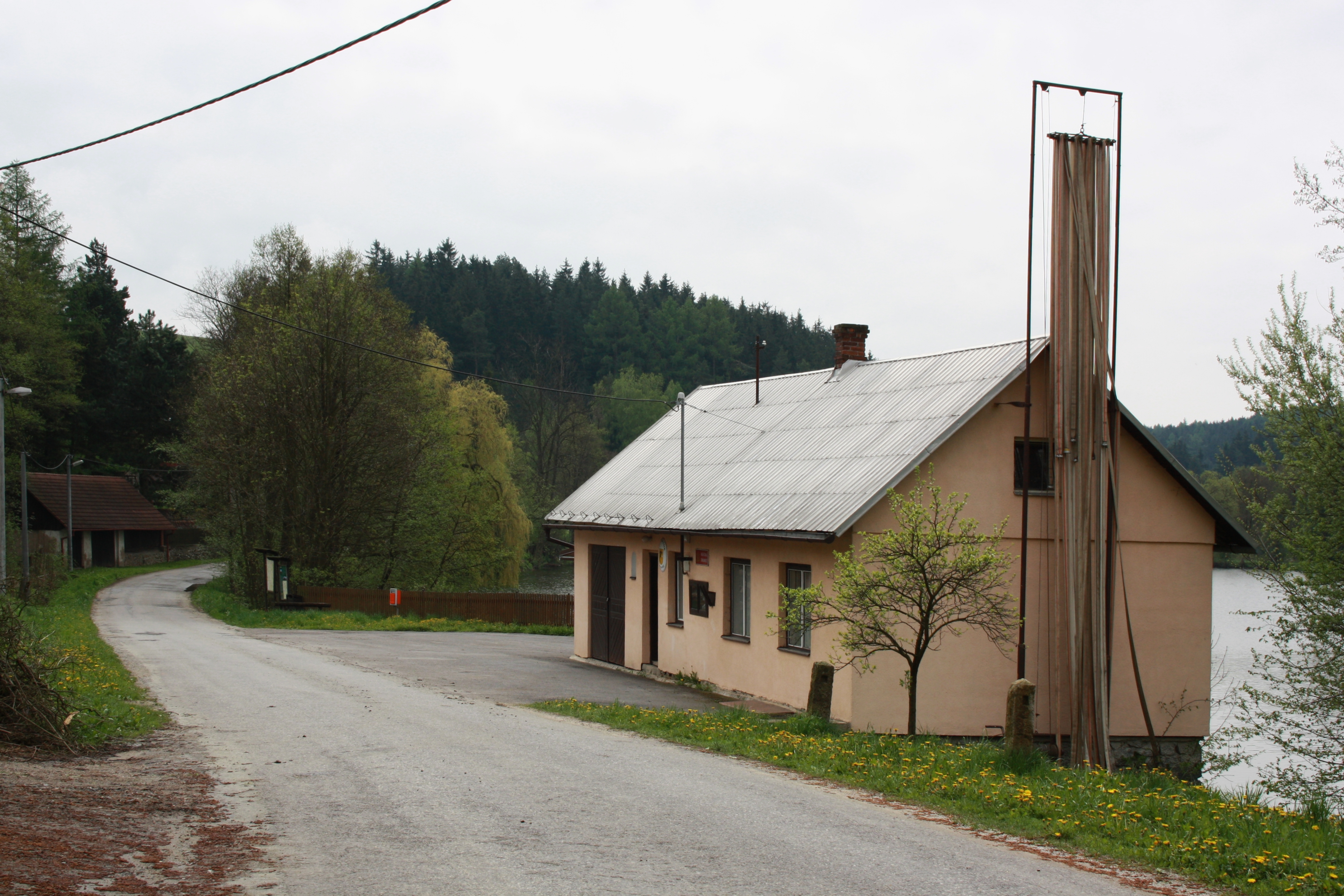 Meziboří - hasičská zbrojnice This photograph was taken within the scope of the 'Czech Municipalities Photographs' grant. This photograph was taken with a DSLR from WMCZ's Camera grant.